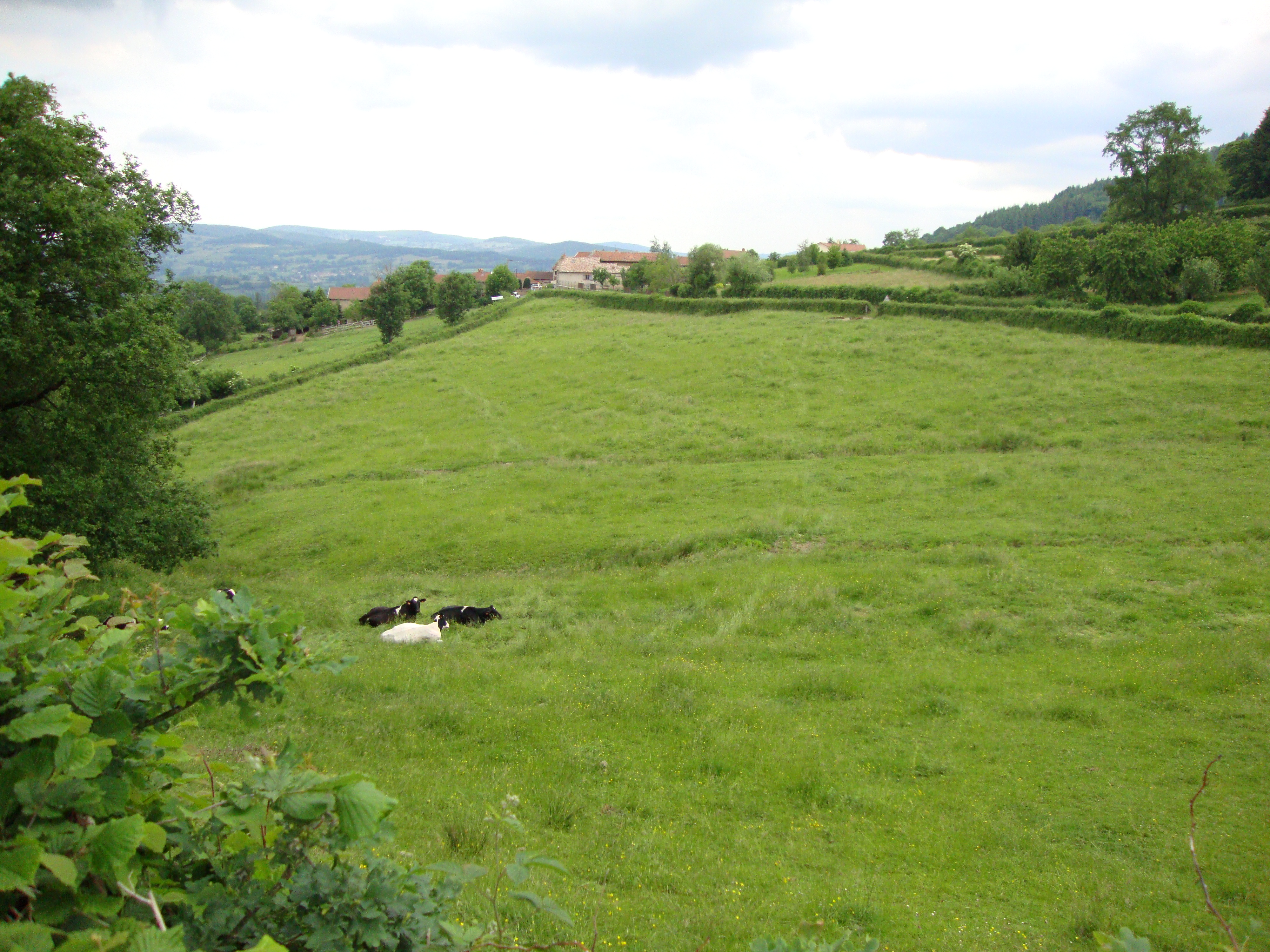 Brandon (Saône-et-Loire, Fr) paysage avec vue sur Les Cours.